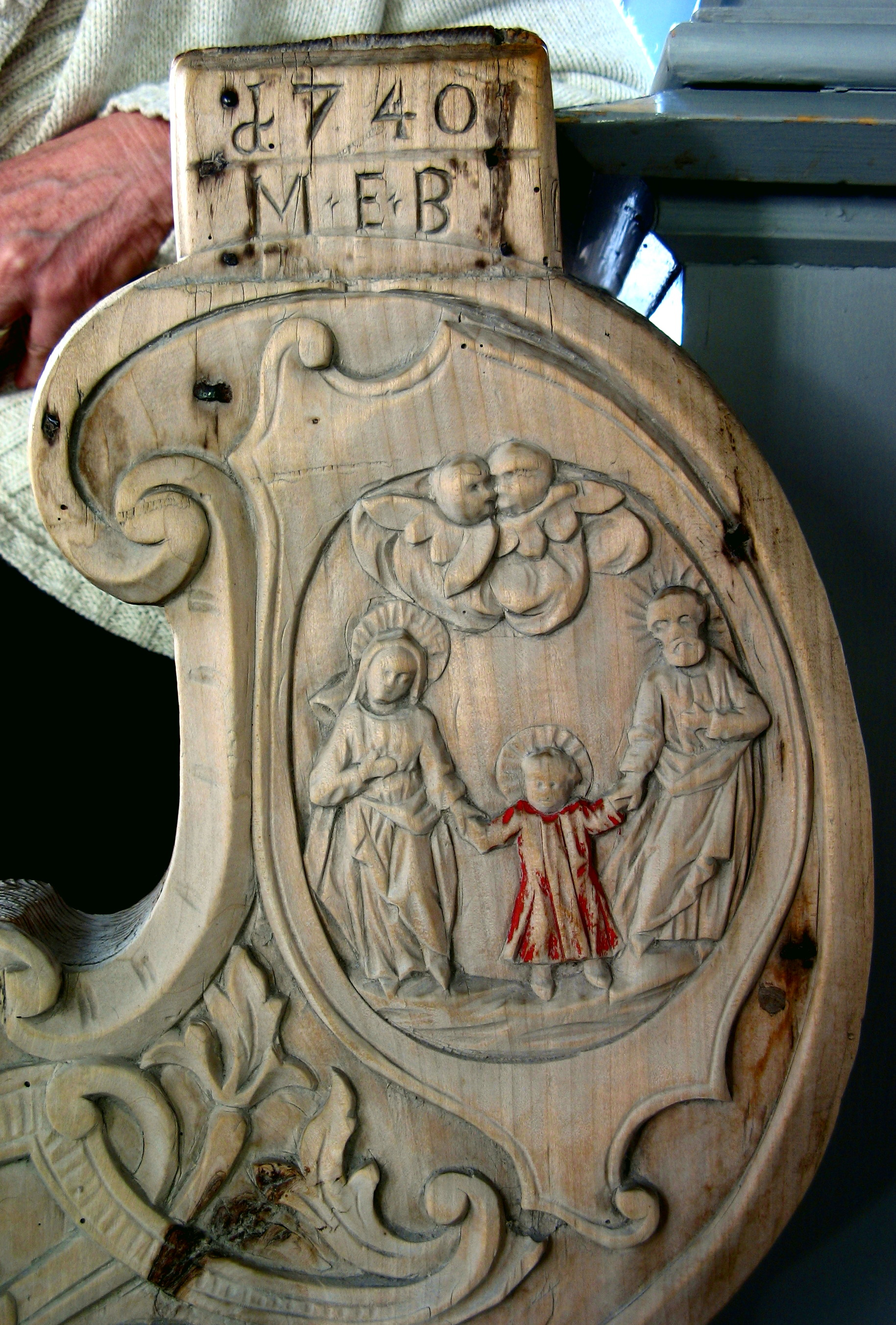 Kirchenbank in der Pfarrkirche zu Hindelang mit den Initialen des Melchior Eberhards